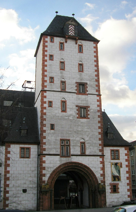 Eisenturm in Mainz Sonstiges: Bildnachbearbeitung von Martin Bahmann (Mai 2006), Originalbild in den Commons unter Eisenturm_Mainz.jpg, Lizenz vom Originalbild eingebunden.